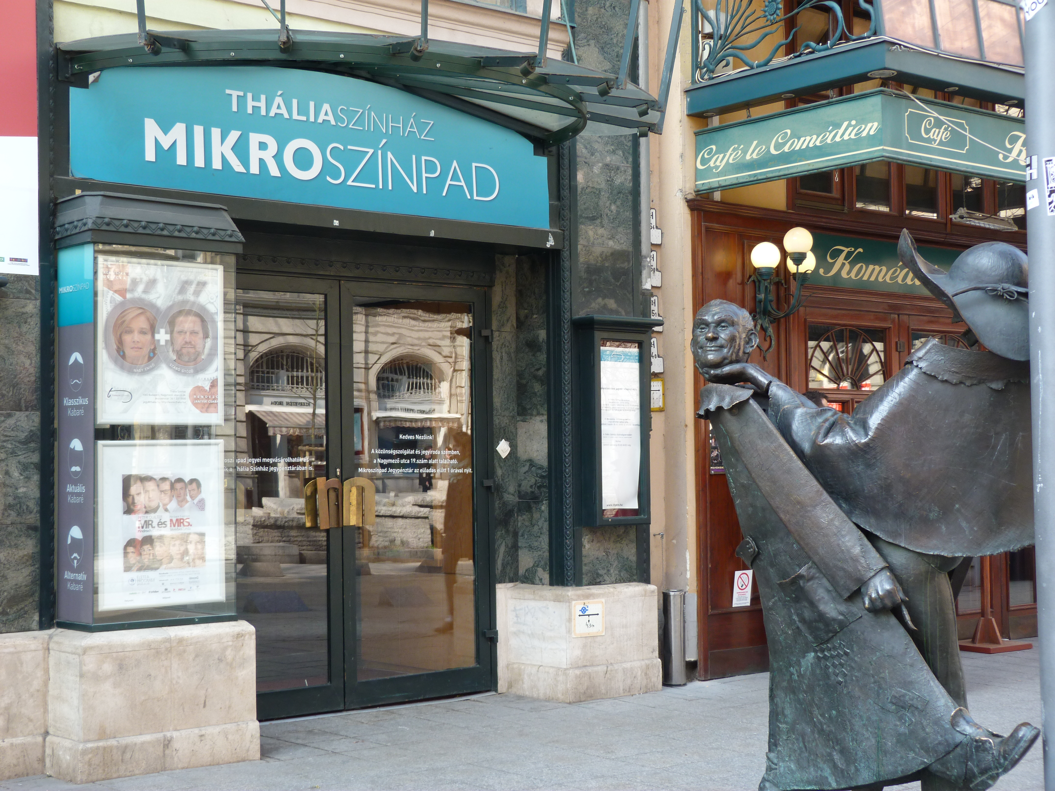 A felvétel 2015. március 23-án készült Budapesten, a Nagymező utcában. Thália Színház, Mikroszínpad. ©© Derzsi Elekes Andor, Budapest, 2015, A fénykép másolását és felhasználását a szerző ellenérték nélkül megengedi. Az engedély kiterjed a kereskedelmi célú hasznosításra is. Kéri azonban nevének feltüntetését a felhasználás során. A Metapolisz sorozat valamennyi képe és filmje Creative Commons alatti. kereskedelmi - for profit - célra is felhasználható. Ajánlott hivatkozás: Derzsi Elekes Andor: Metapolisz DVD line